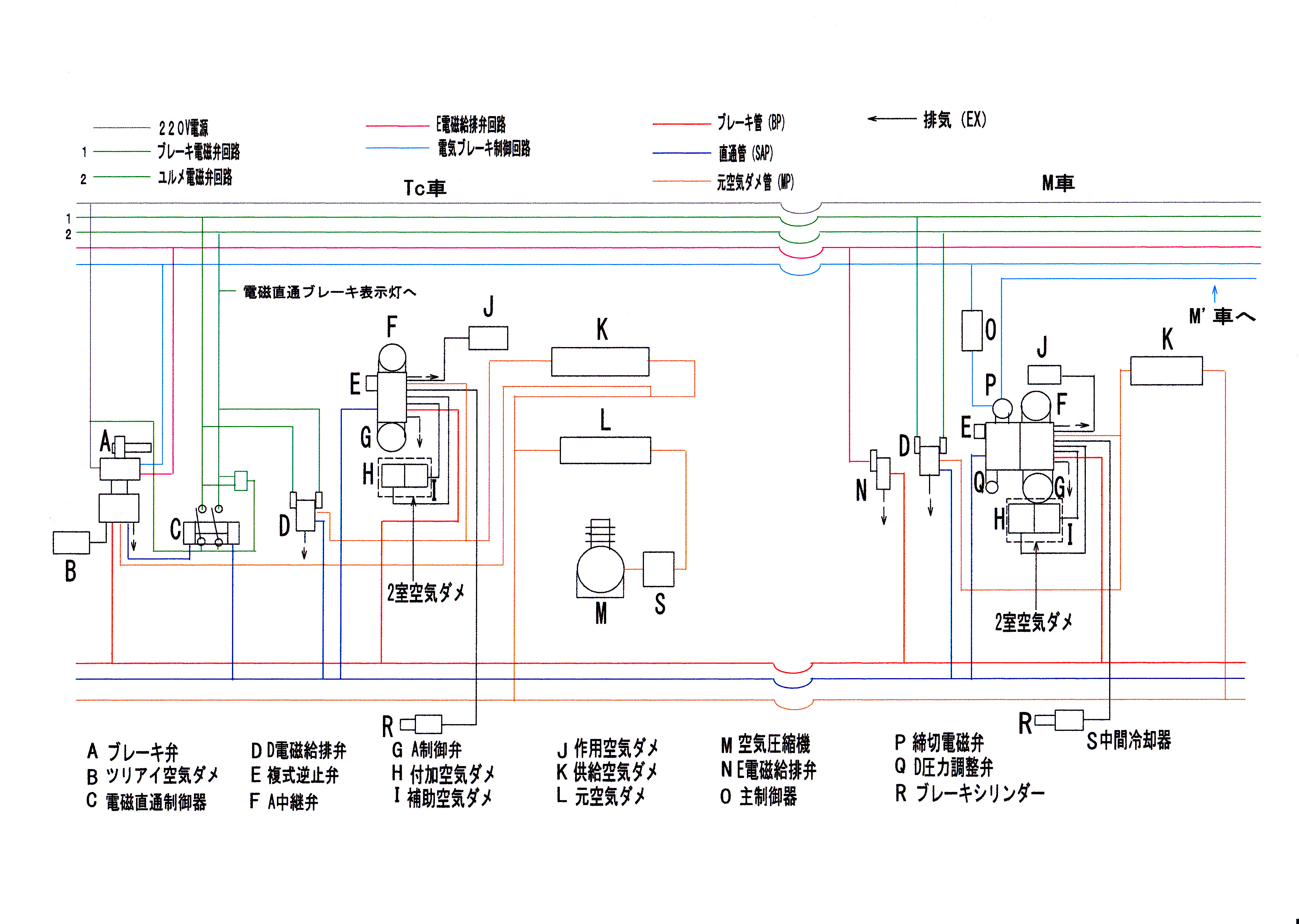 自動ブレーキ併用電磁直通ブレーキ（国鉄のSEDブレーキ）のモデル図